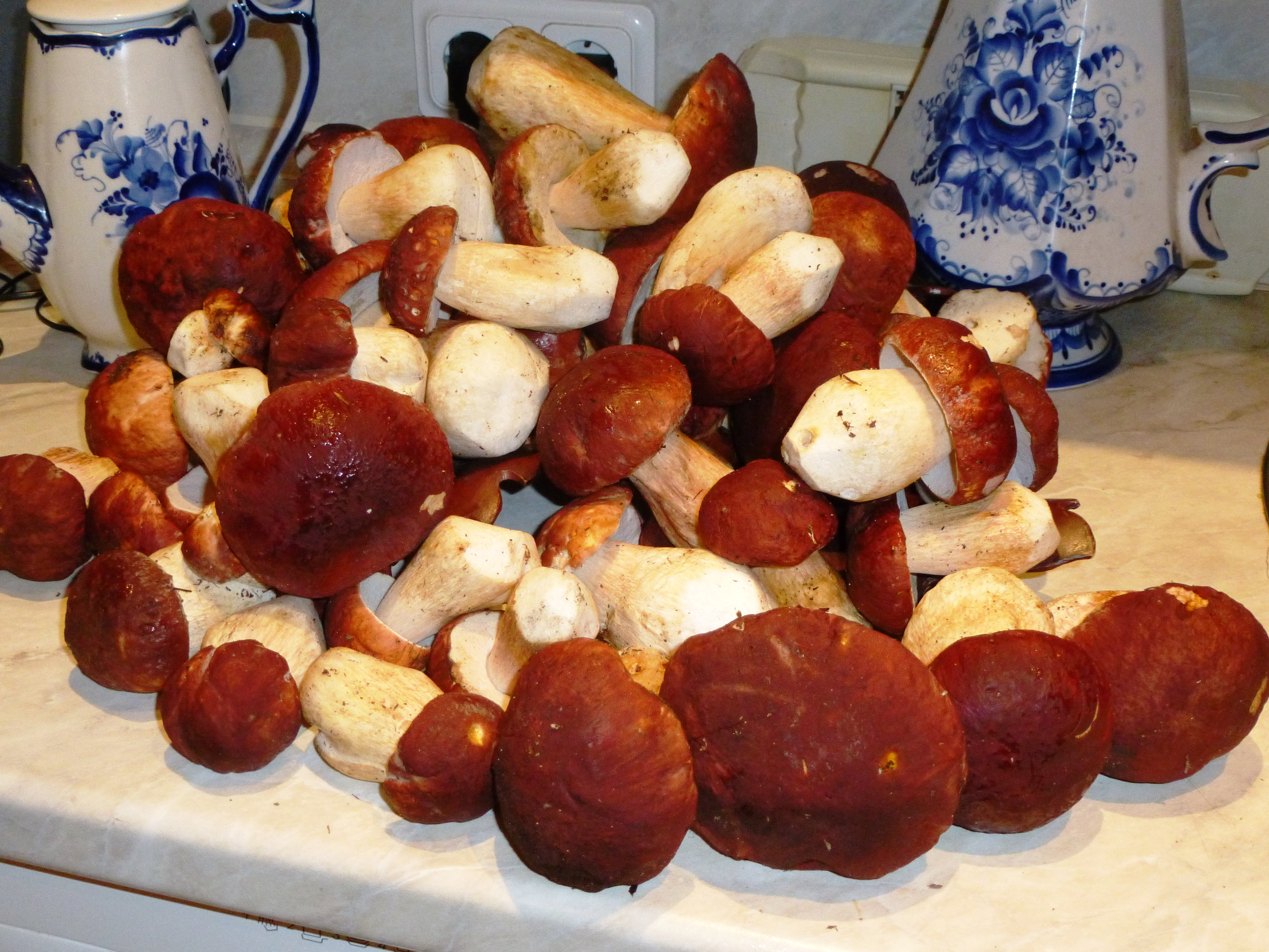 Белые грибы. Собраны в Олонецком районе Карелии.